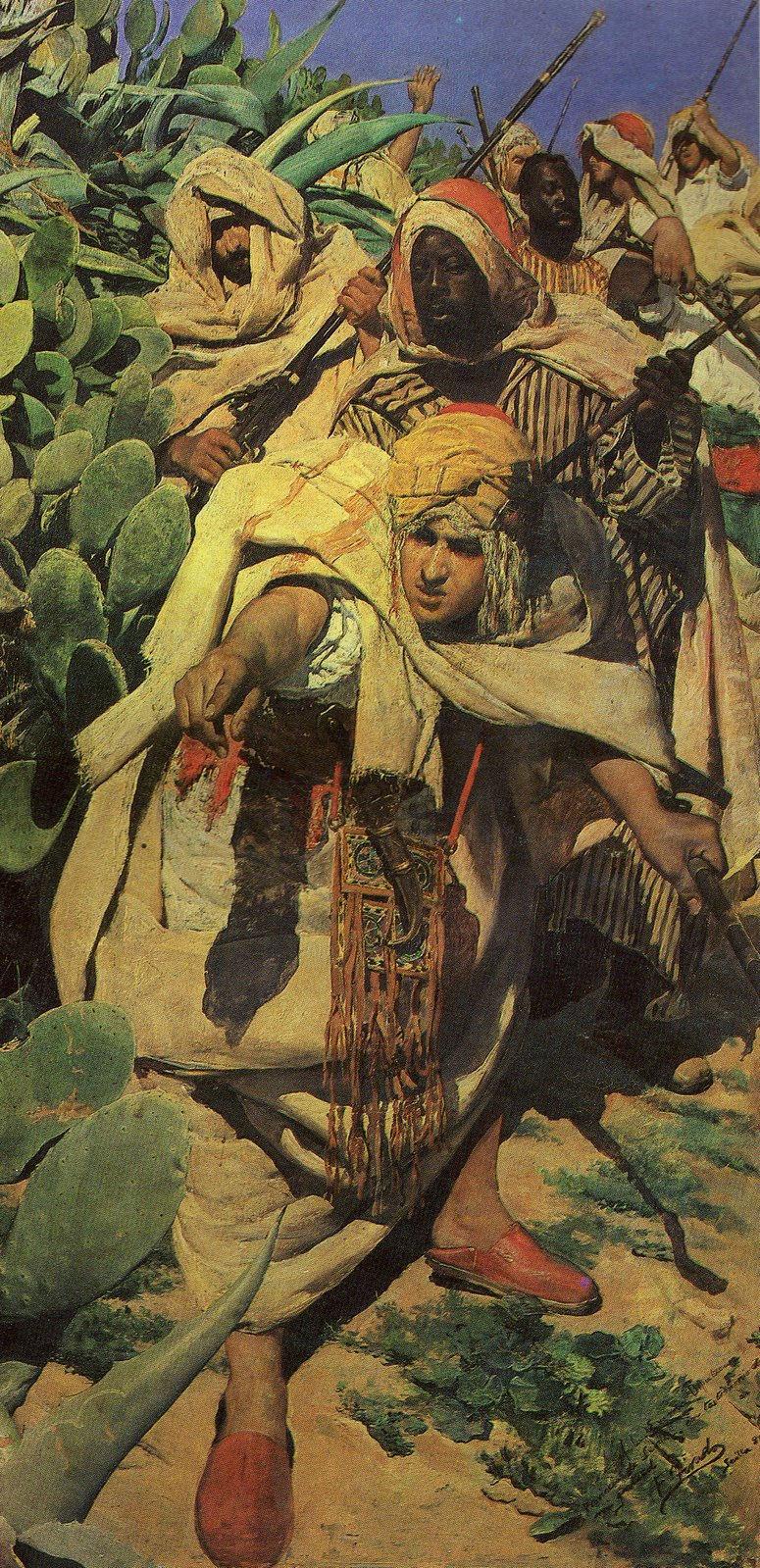 La obra representa a un grupo de soldados moros preparándose para tender una emboscada.